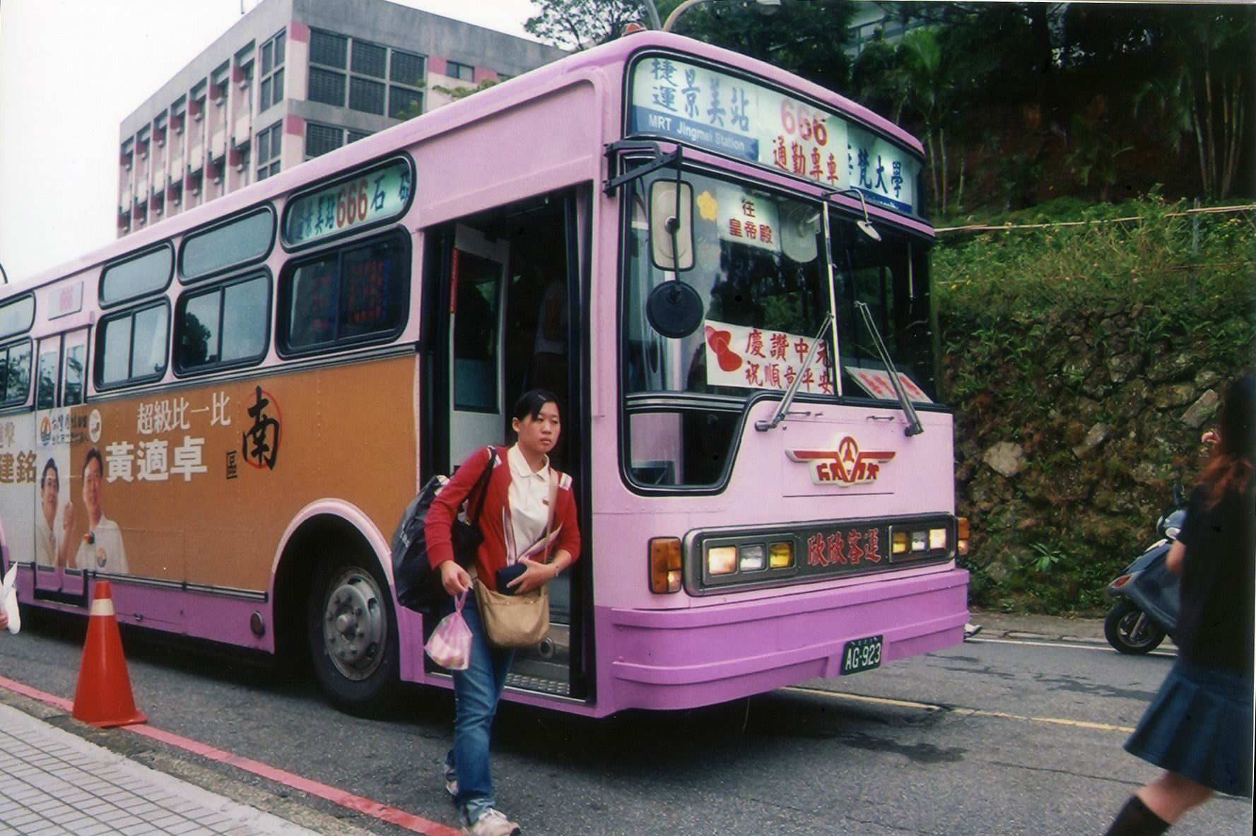 欣欣客運Isuzu LT134P大客車AG-923，行駛臺北市聯營公車666線。